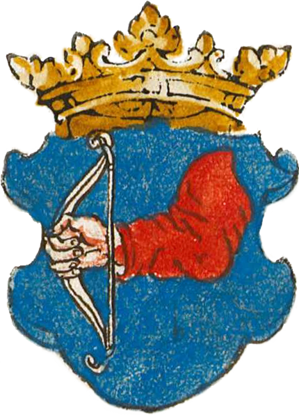 Герб Киева в гербовнике, изданном в Южной Германии в первой половине XVI века, С. 50r.